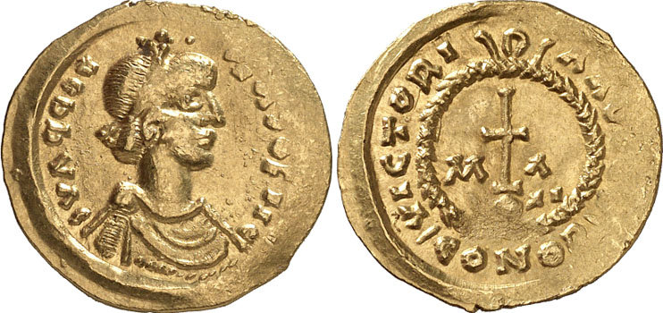 Moneda acuñada durante el imperio de Focas